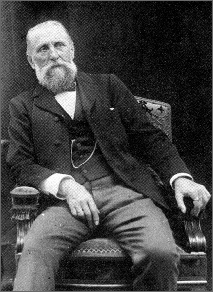 Friedrich Adler, deutscher Architekt, Bauforscher und Archäologe